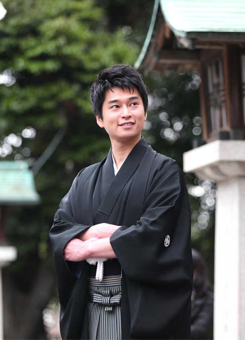 小杉樹彦（こすぎたつひこ）